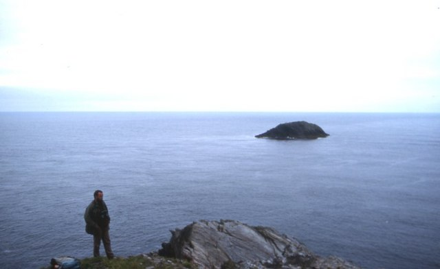 Out Stack